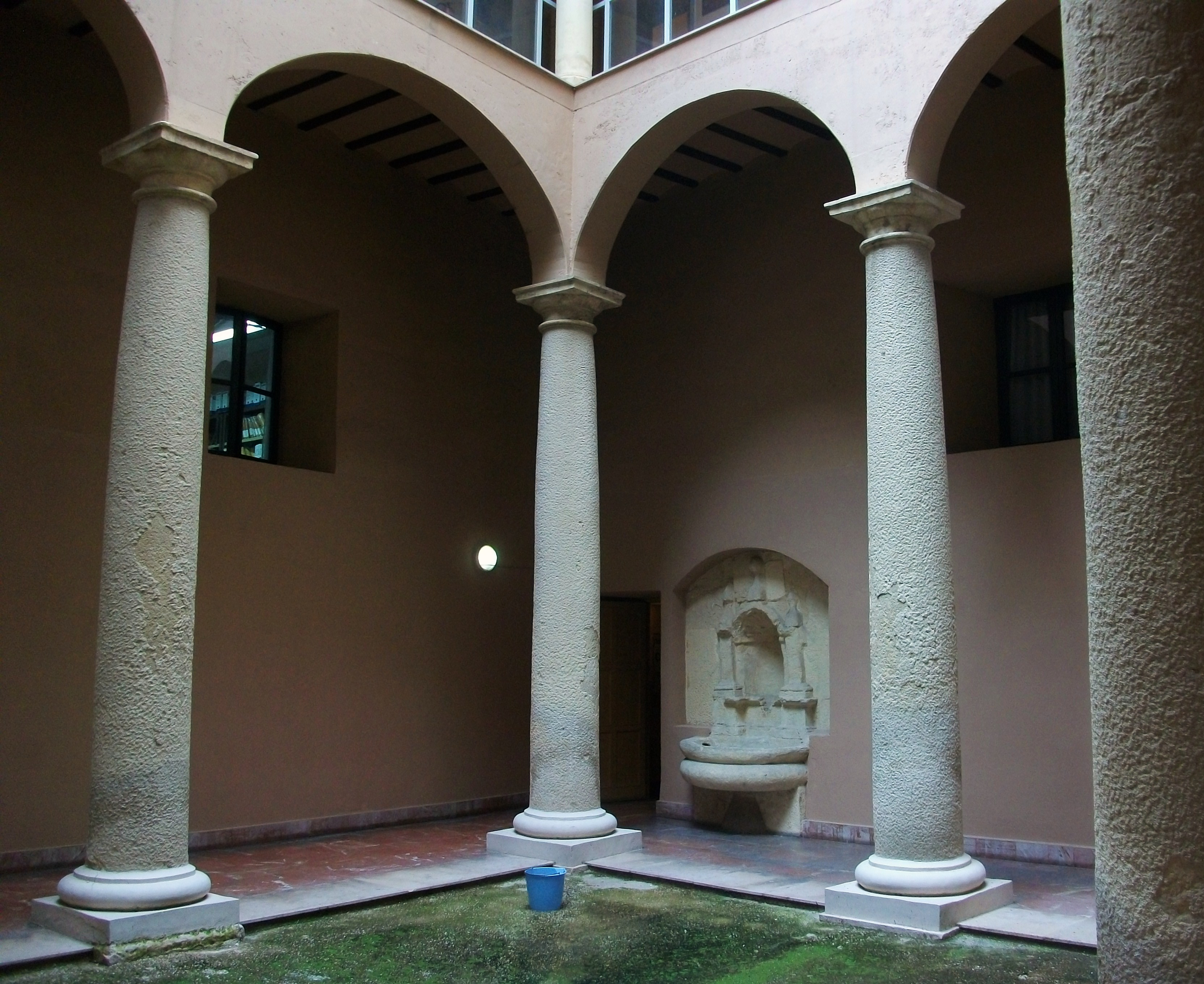 Pati del palau d'Alarcó, Xàtiva.